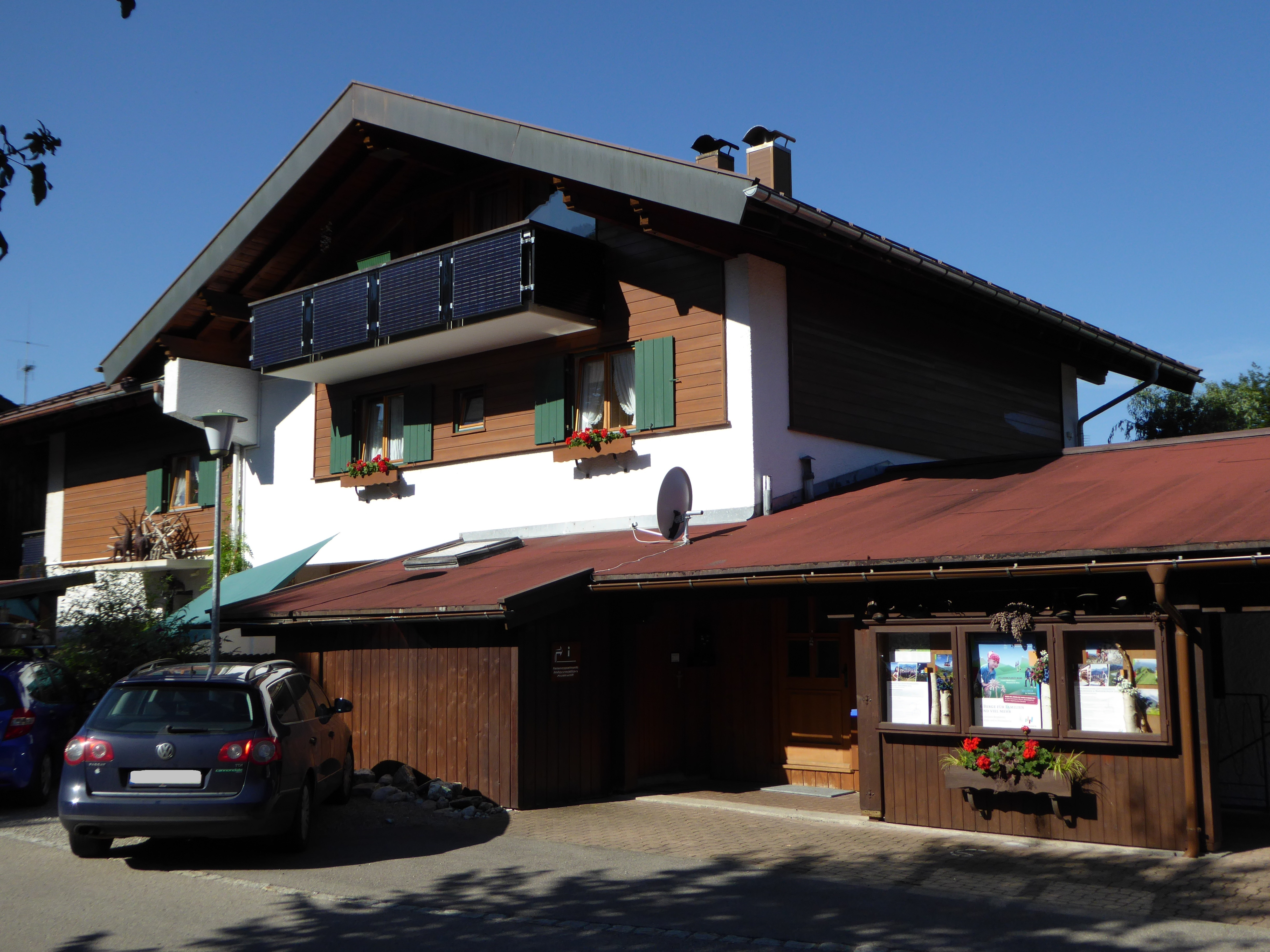 Erneuerbare Energien in Oberstdorf Photovoltaik-Solaranlagen Ferienwohnungen Alpensonne Integration in Balkonverkleidung